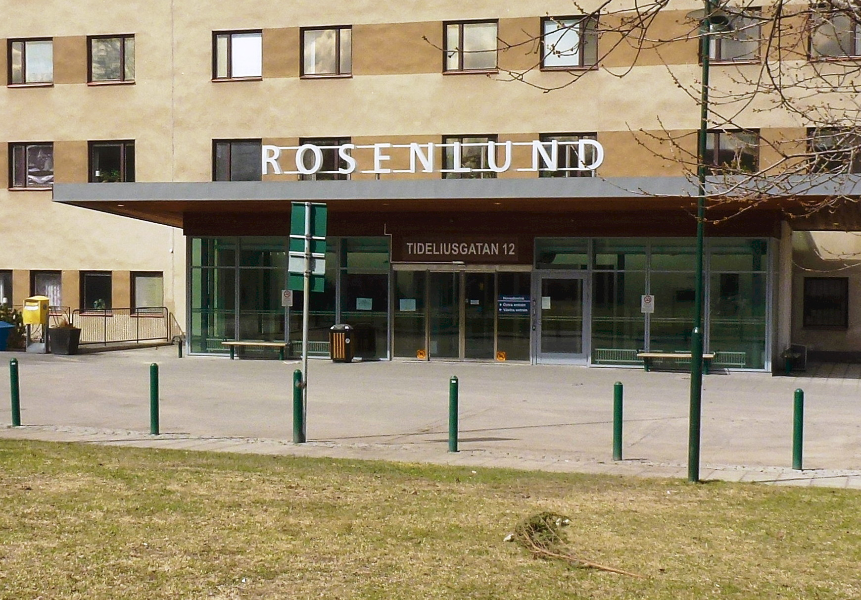 Rosenlunds sjukhus entré